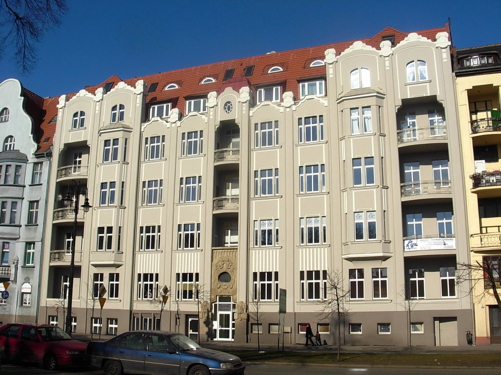 Kamienica ul. Mickiewicza 3 w Bydgoszczy, proj. Erich Lindenburger, 1904-1905